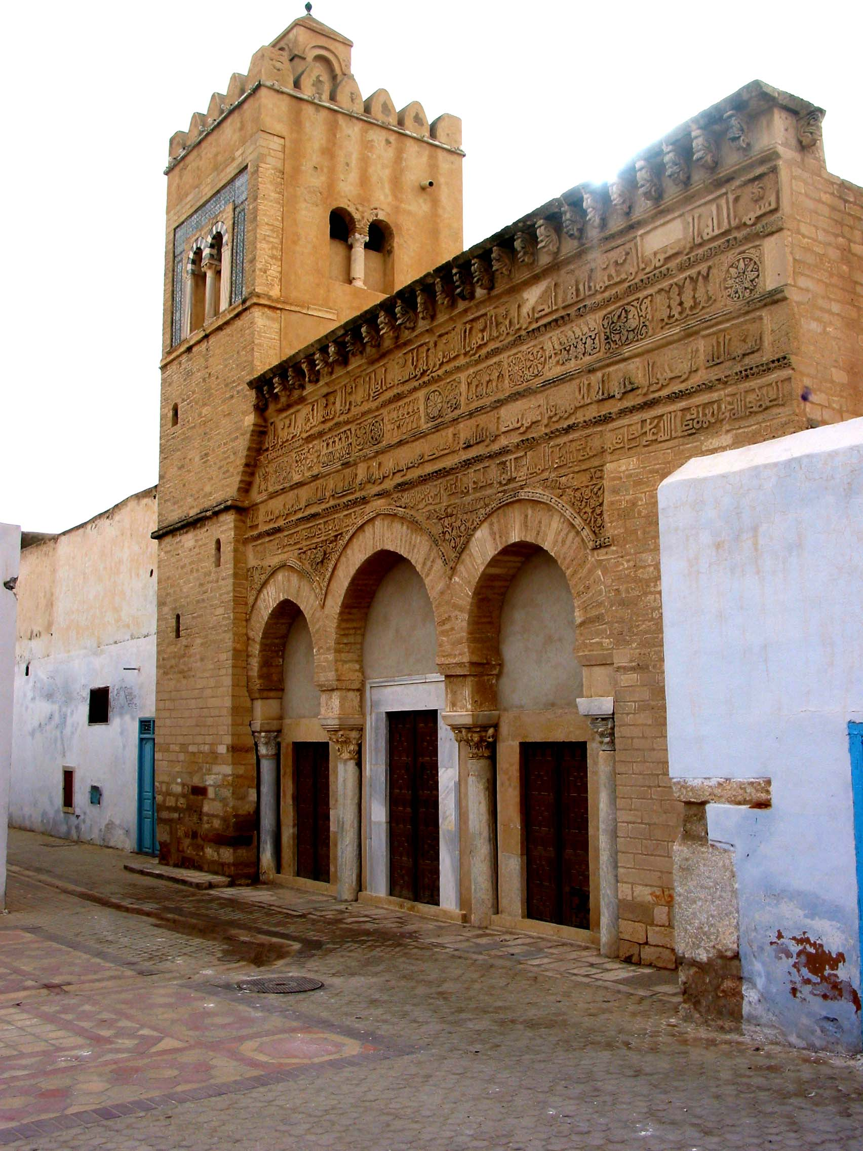 Kairouan